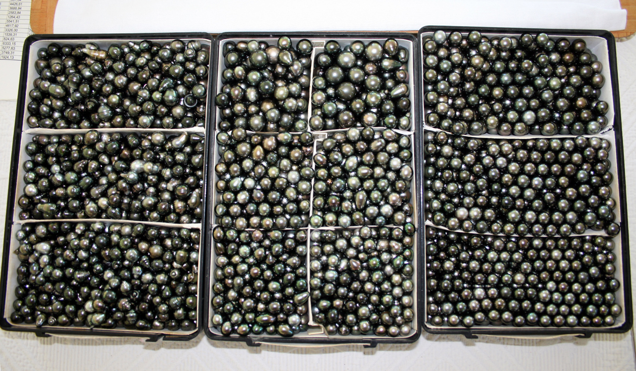 Perles de Tahiti